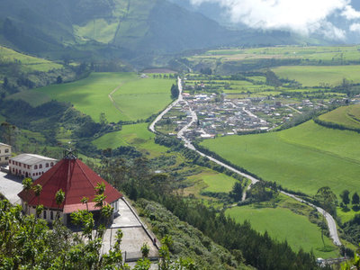 Parroquia de Lloa desde la iglesia de "El Cinto"